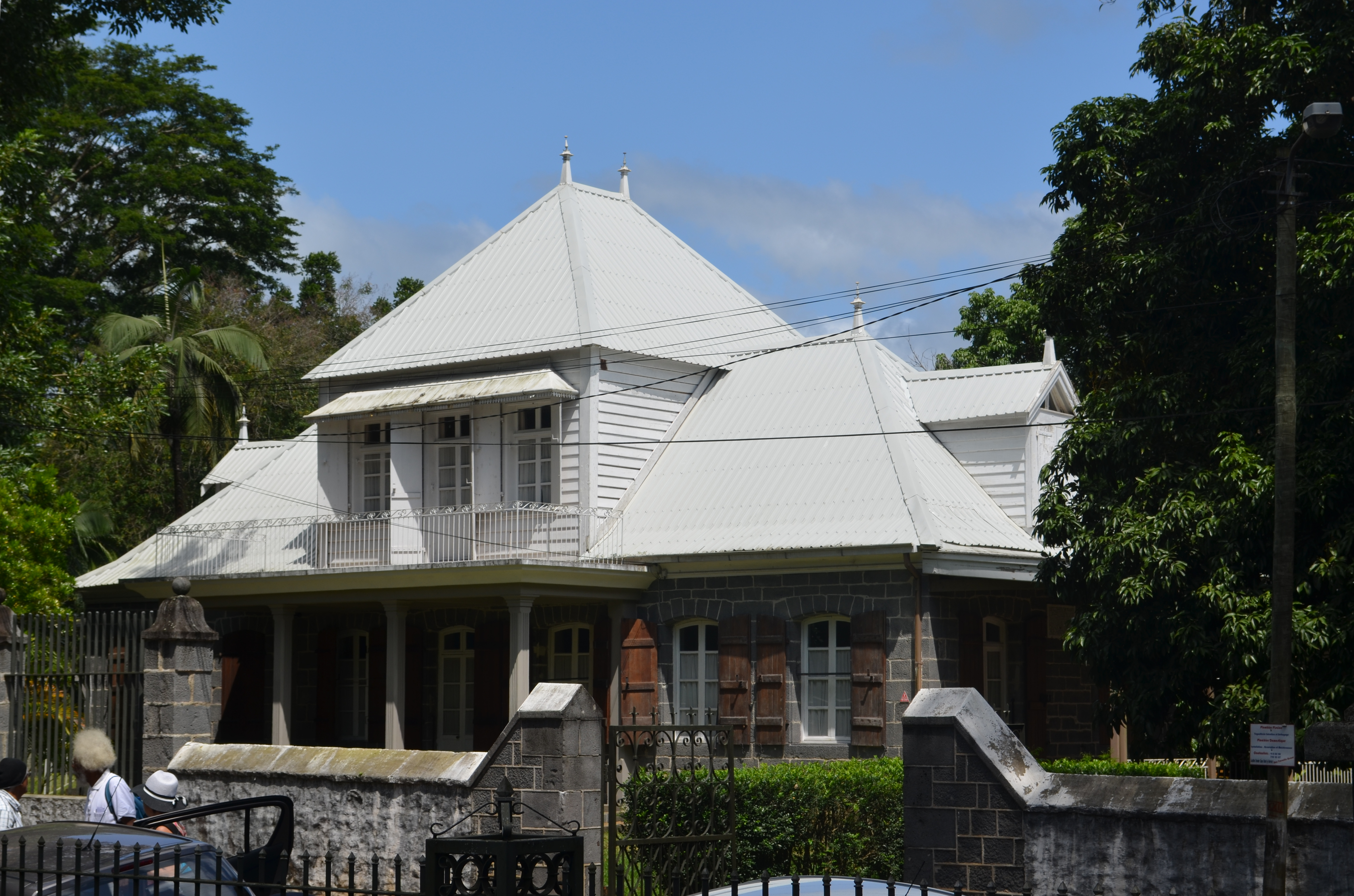 Pamplemousses, Presbytère